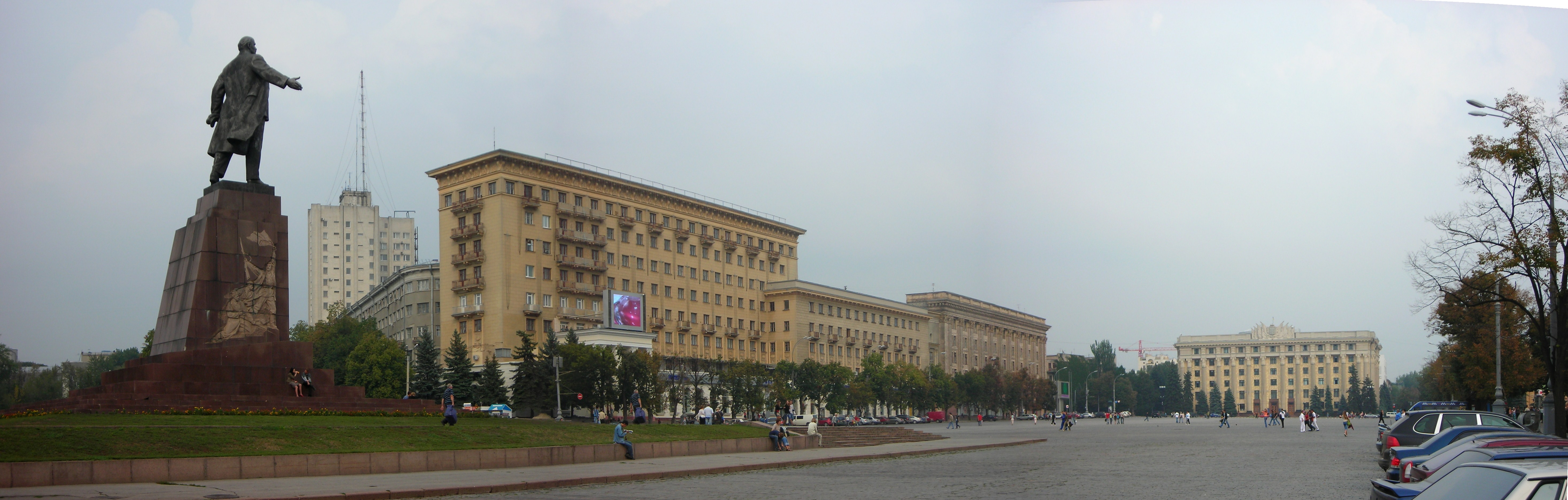 Площадь Свободы, Харьков. Восточная часть.